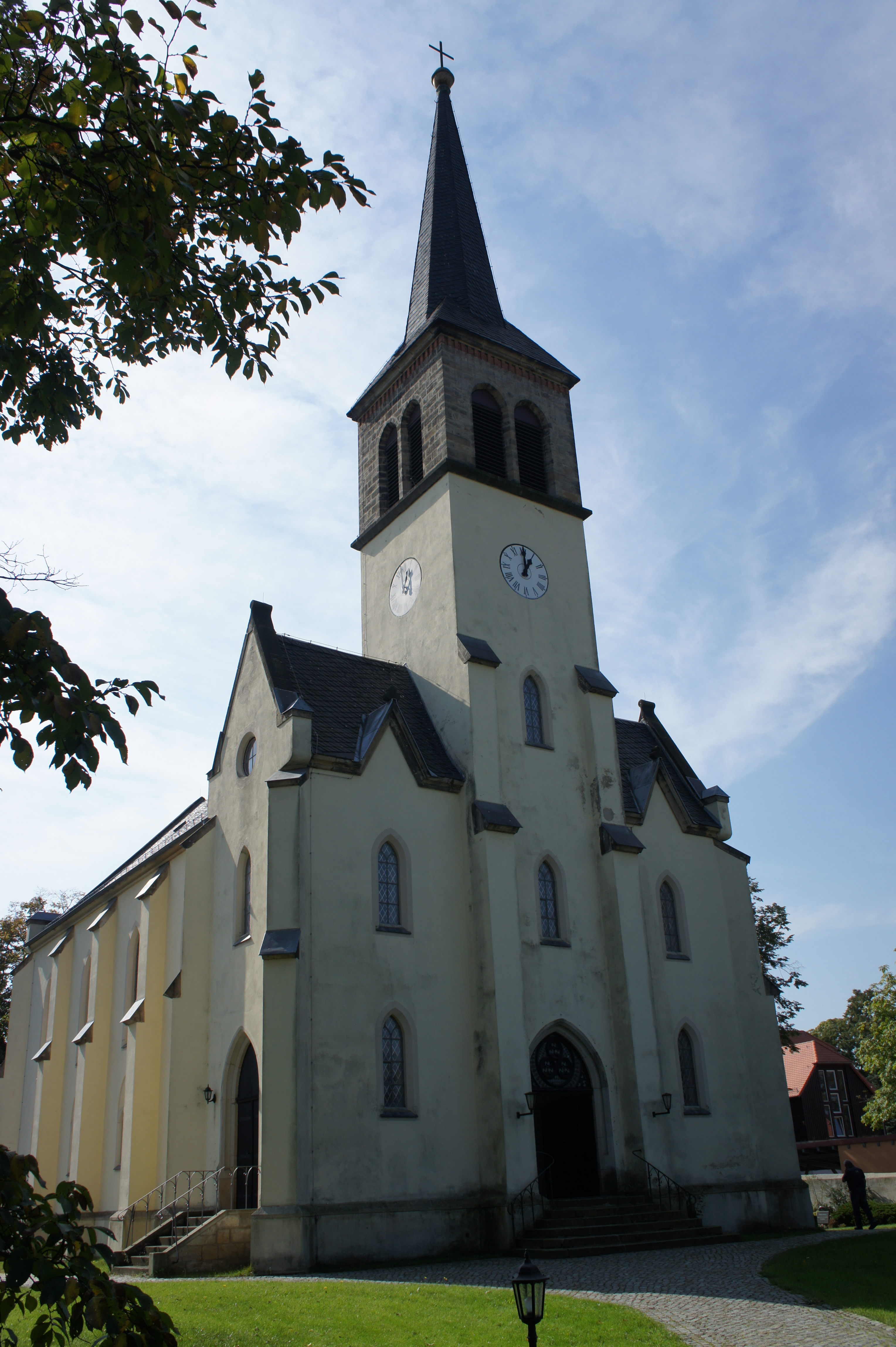 Kirche Ottendorf-Okrilla Die 1610 errichtete Kirche brannte 1873 infolge eines Blitzeinschlages ab, die neue Kirche wurde 1875 geweiht und 1995 saniert